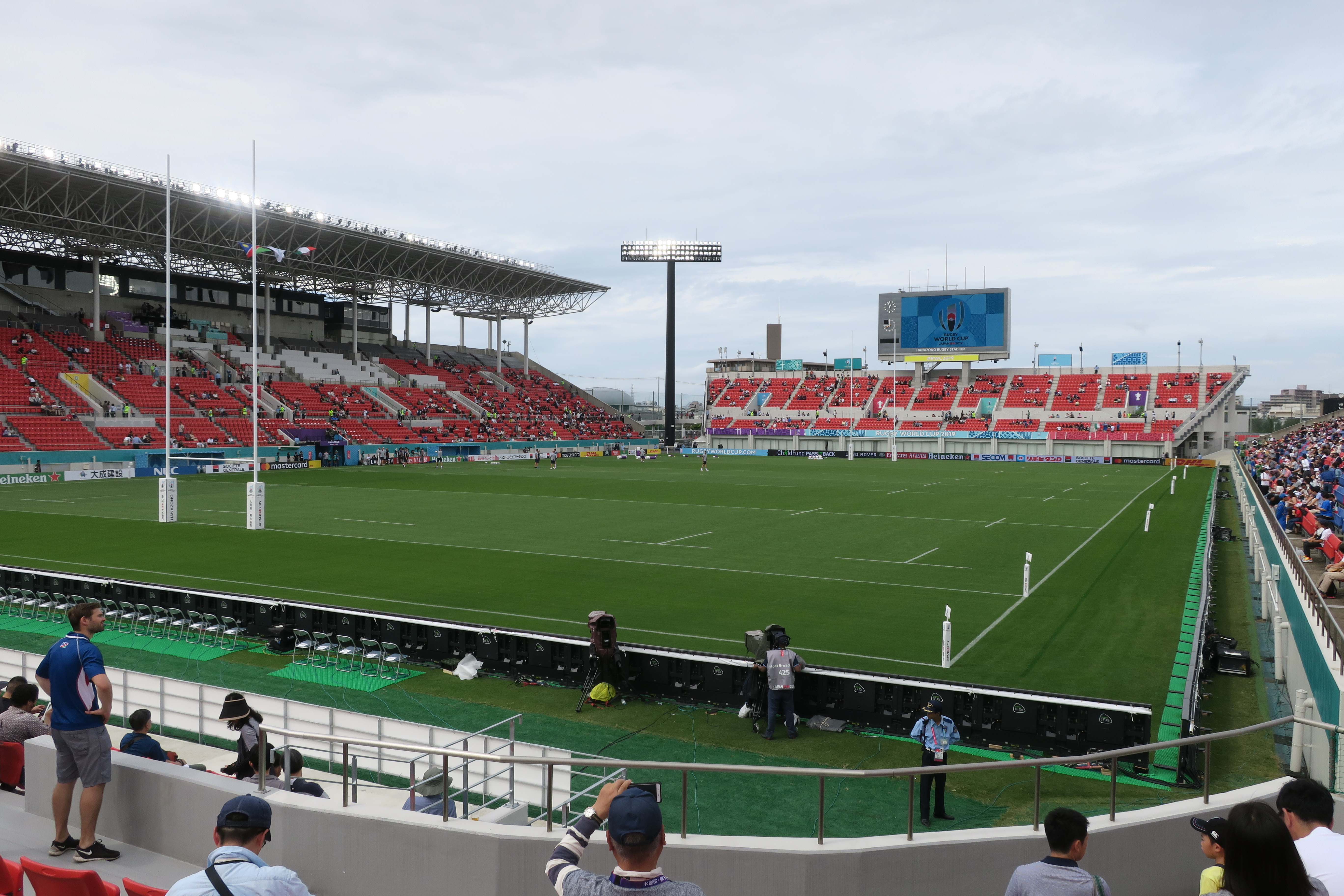 東大阪市花園ラグビー場グラウンド（2019年9月22日、イタリア対ナミビア）